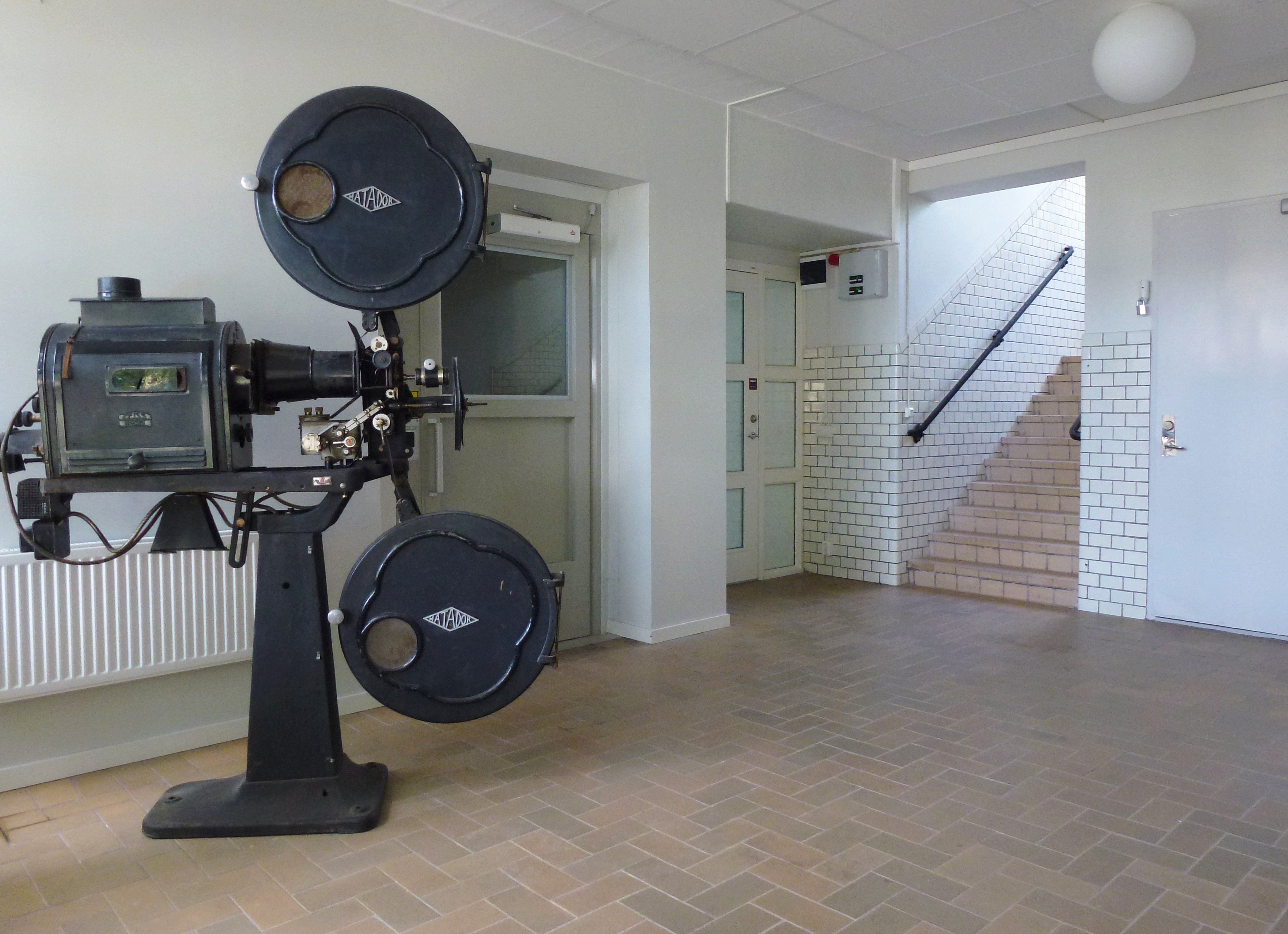 Filmarkivet Grängesberg, entré